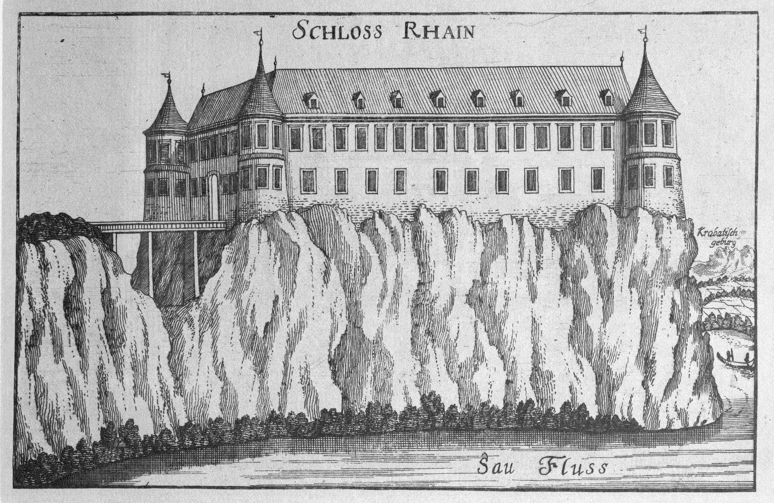 G. M. Vischers Käyserlichen Geographi, Topographia Ducatus Stiriae, Das ist: Eigentliche Delineation / und Abbildung aller Städte / Schlösser / Marcktfleck / Lustgärten / Probsteyen / Stiffter / Clöster und Kirchen / so es sich im Herzogthumb Steyrmarck befinden; Und anjetzo Umb einen billichen Preyß zu finden seynd Bey Johann Bitsch Universitäts Buchhandlern / Auff dem Juden=Platz bey der guldenen Saulen. Graz 1681 Die Nummerierung der Dateien folgt der alphabetischen Reihung der Ortsnamen und entspricht nicht dem Vischer-Register, die Vischer-Registernummer ist 290